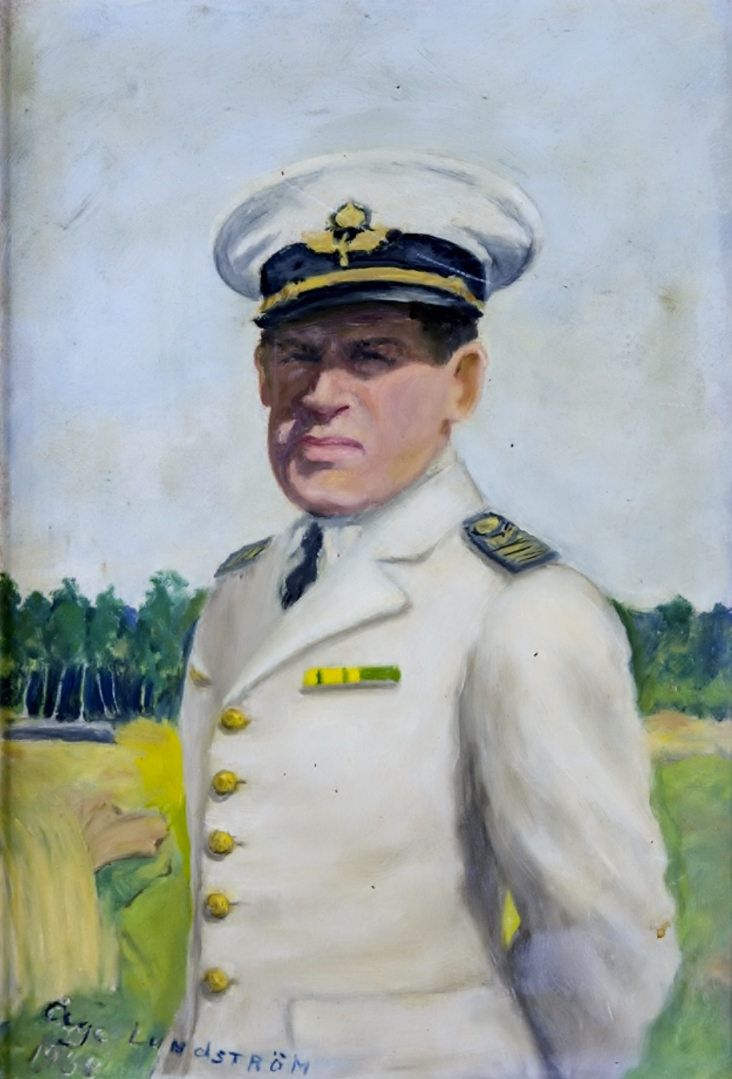 Personporträtt Gustaf Qvisse Ström , kapten och förste chefen för flygskolan i Ljungbyhed, var mera känd under namnet"QVISSE". Tavlan signerad: Åge Lundström 1939.